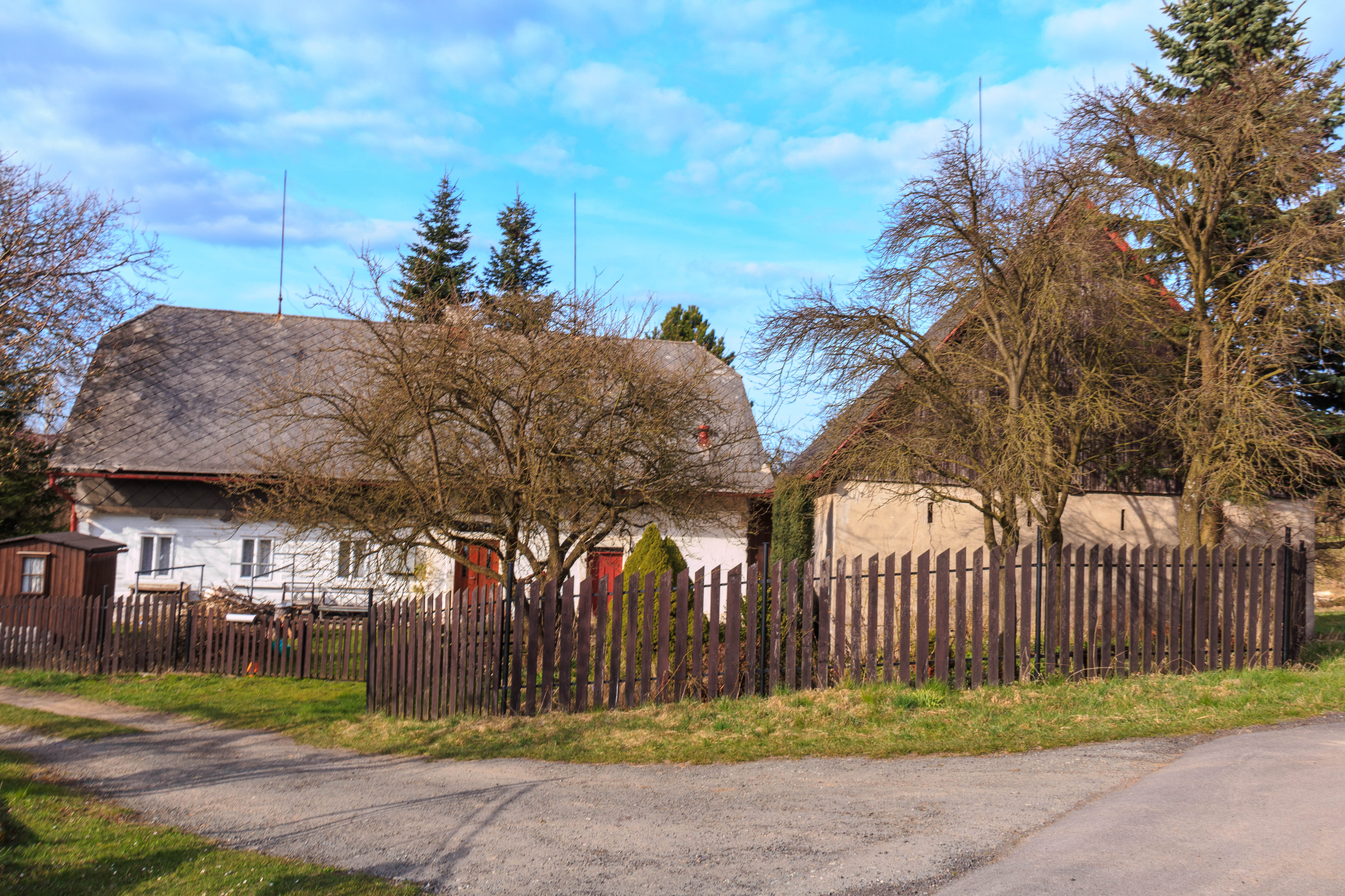 Olešnice u Červeného Kostelce čp. 112